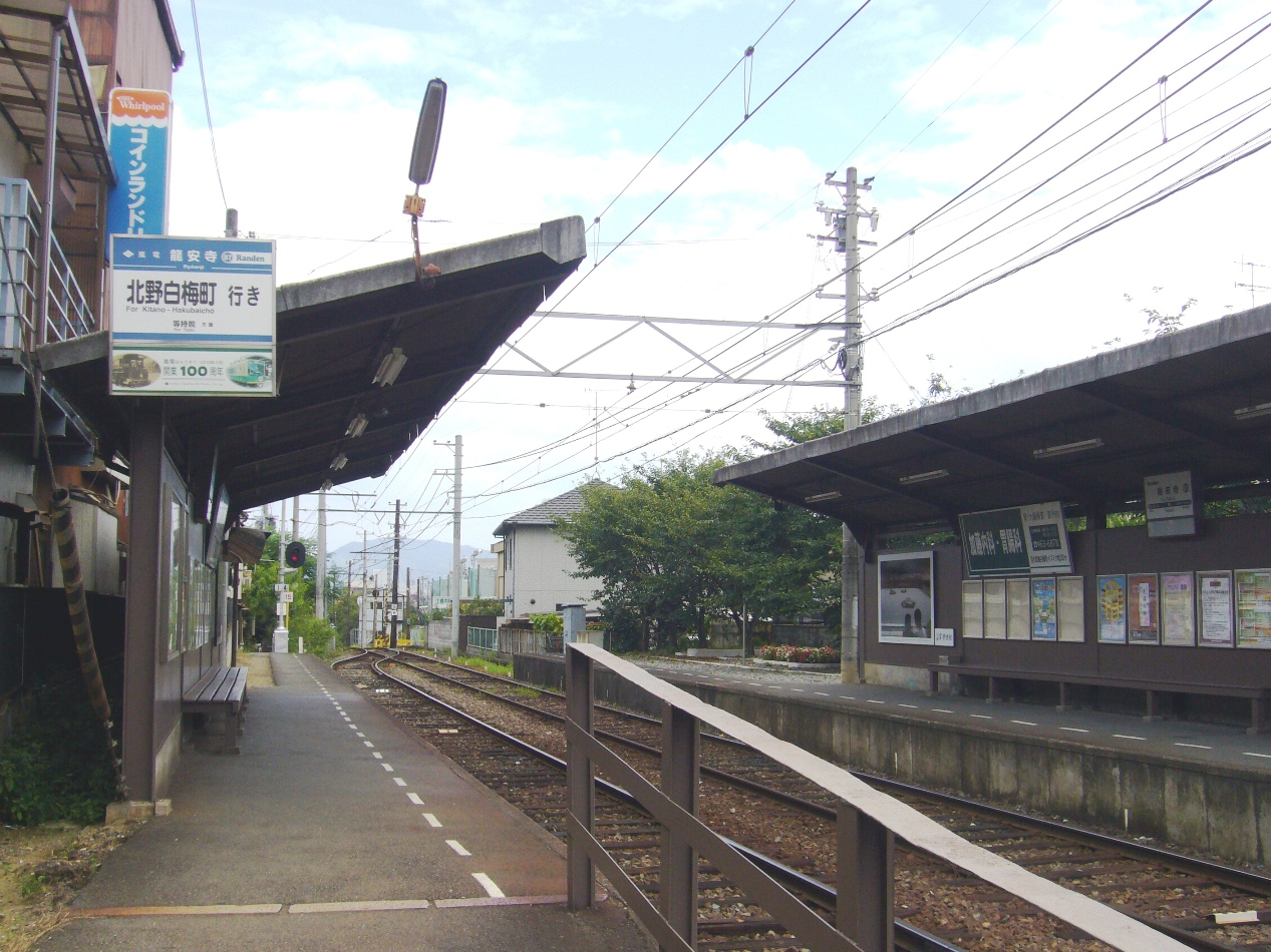 京福電気鉄道北野線龍安寺駅。2007年9月5日に投稿者が撮影。